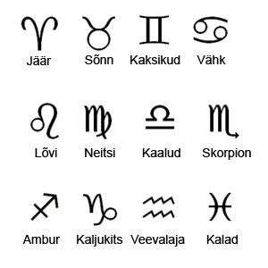 Tähtkujud